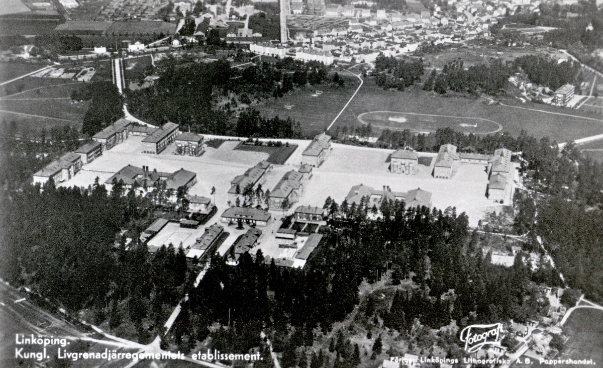 Flygfoto över Livgrenadjärregementets etablissement i nordvästlig riktning. I bakgrunden ser man Stolplyckan i Linköping.